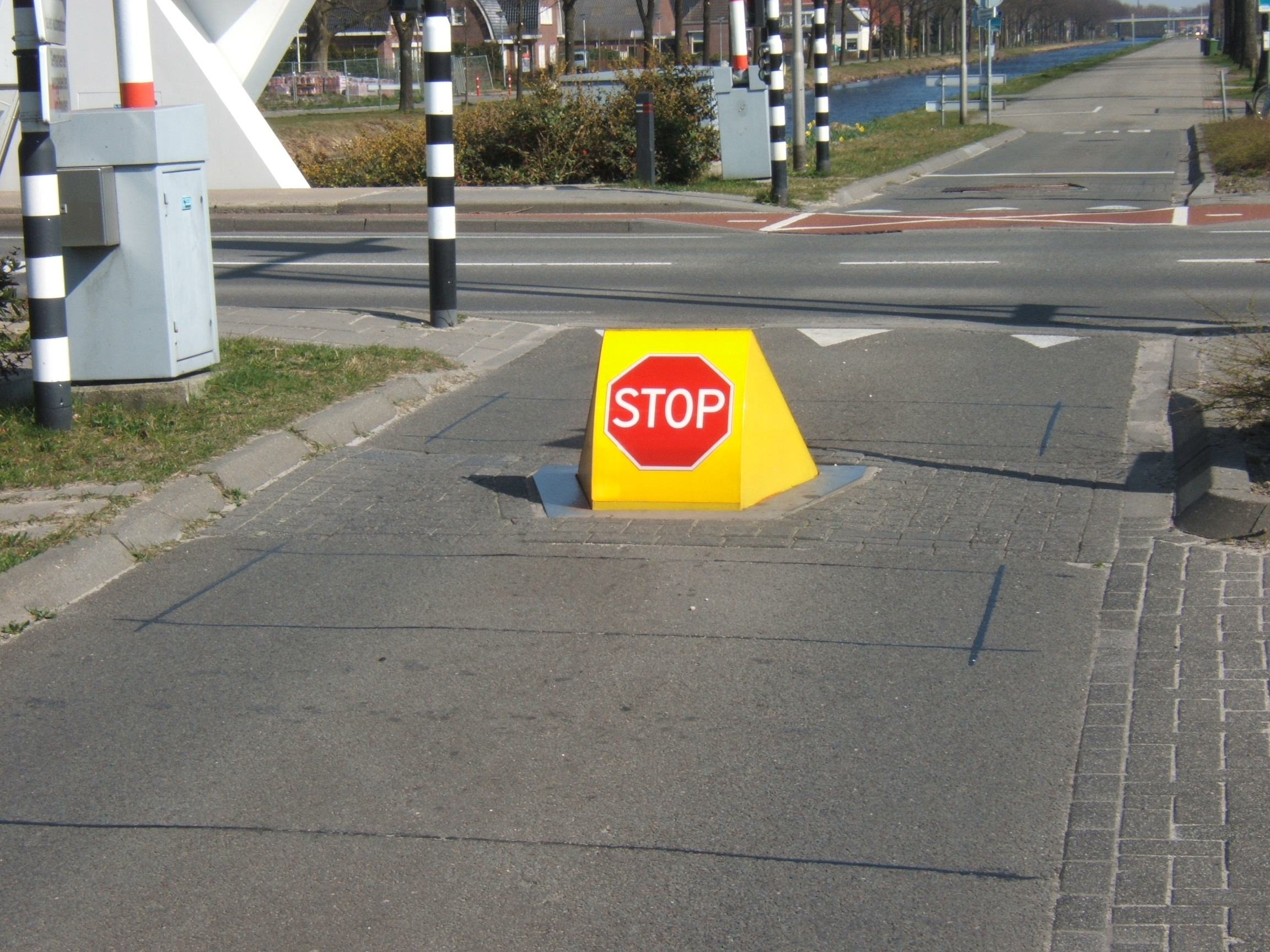 Bussluis in de woonwijk kloosterveen in Assen. Eigen werk Bus trap, Assen the Netherlands